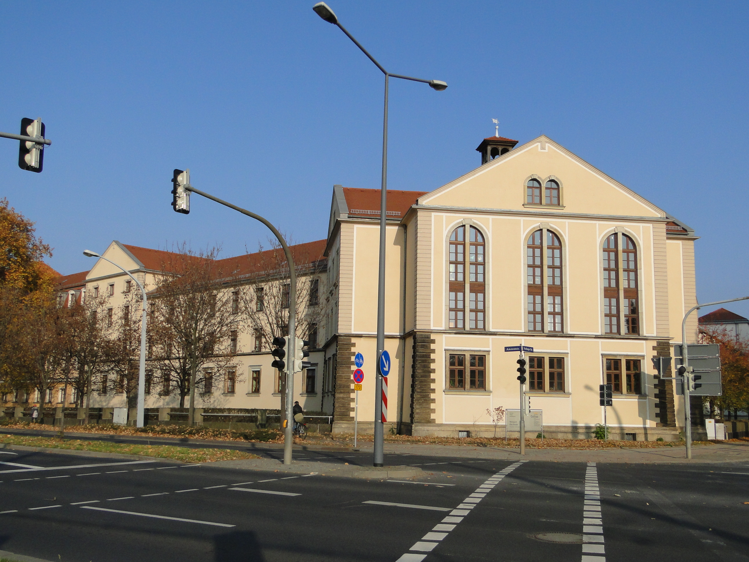 Wohnpark Elsa Fenske an der Ammonstraße Ecke Freiberger Straße in Dresden